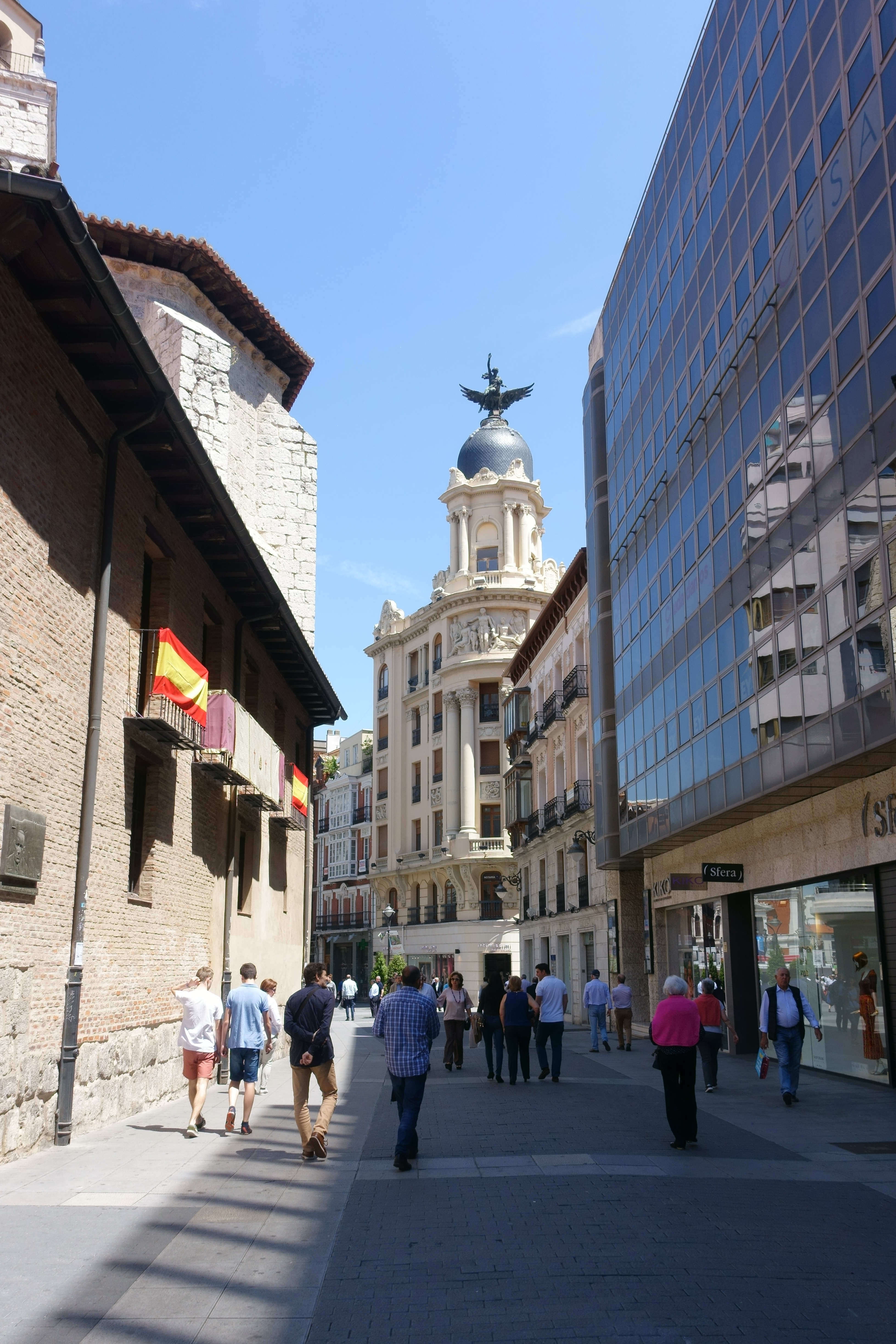 Edificio La Unión y el Fénix, en la calle Santiago de Valladolid (España).